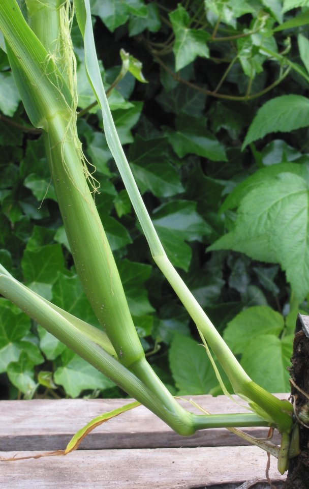 Zea mays